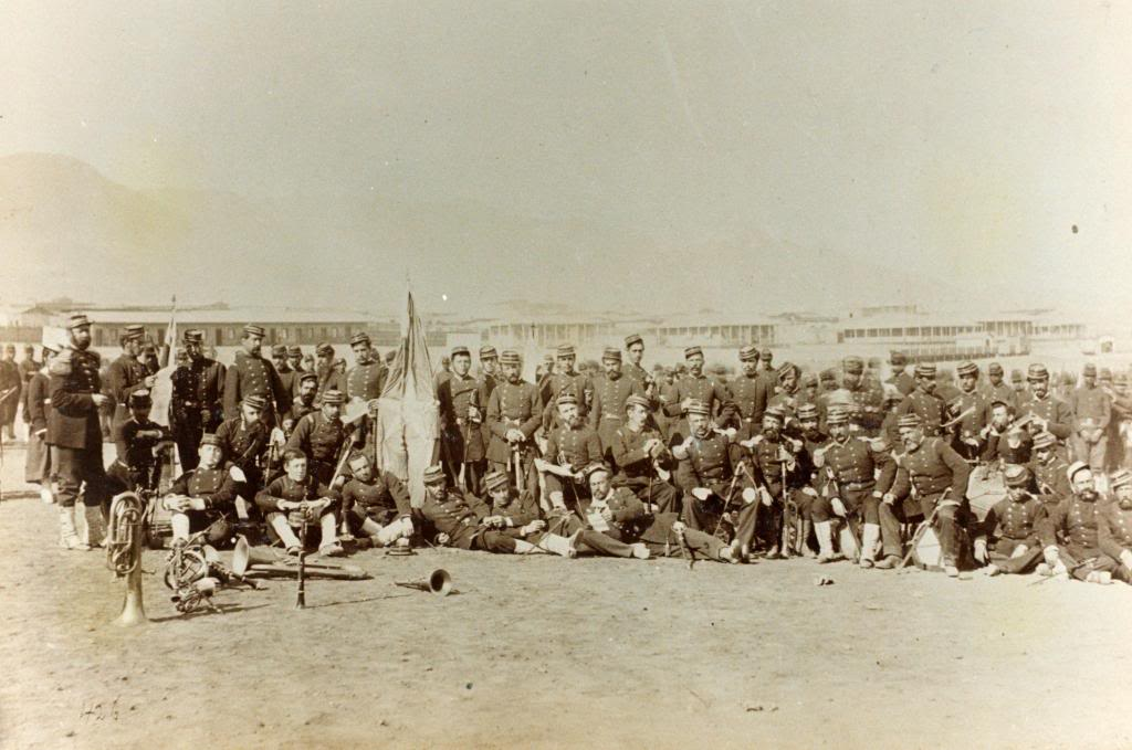 Oficialidad del Regimiento 2º de Línea en Antofagasta 1879